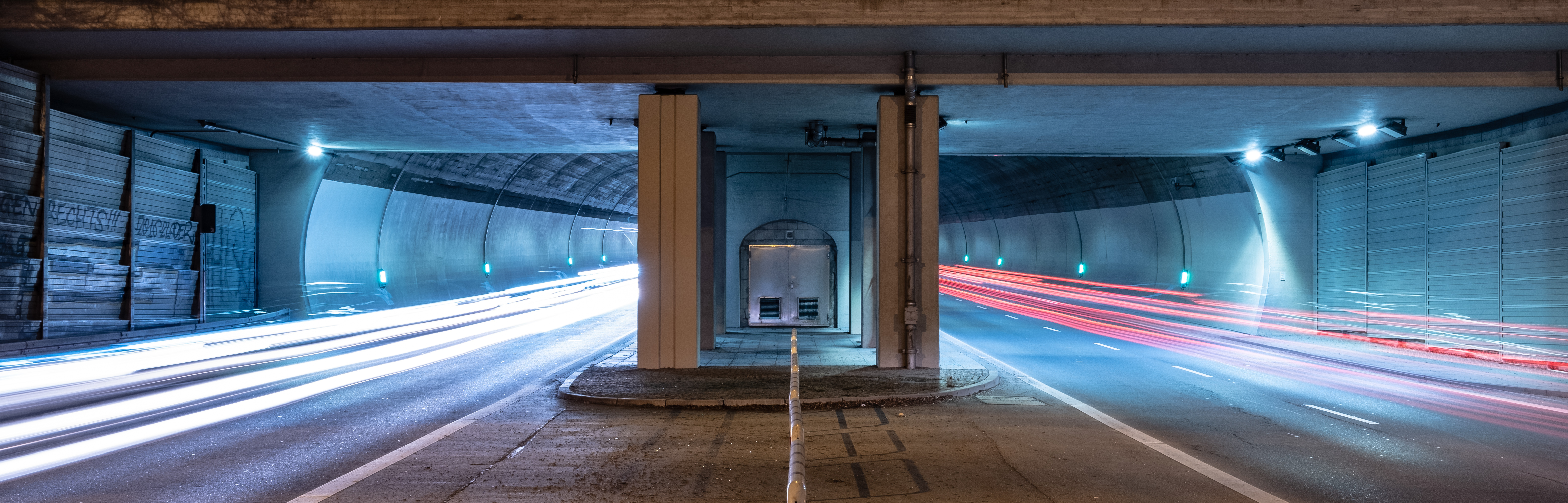 Schlossbergtunnel in Tübingen bei Nacht